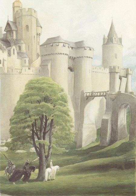 Grand campement comme on en installe pour les tournoi ,avec des estrades, des tentes bariolées et des centaines de bannières.